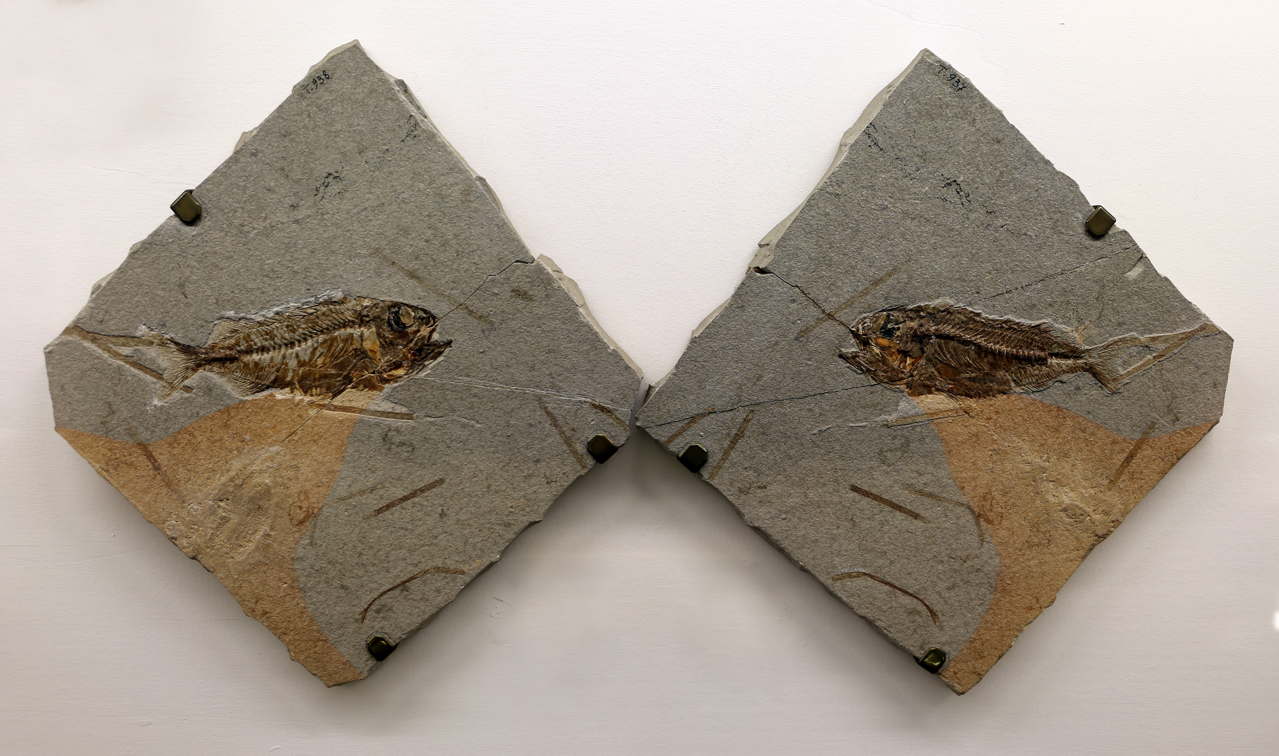 Museo civico di storia naturale di Verona This is a photo of a monument which is part of cultural heritage of Italy.